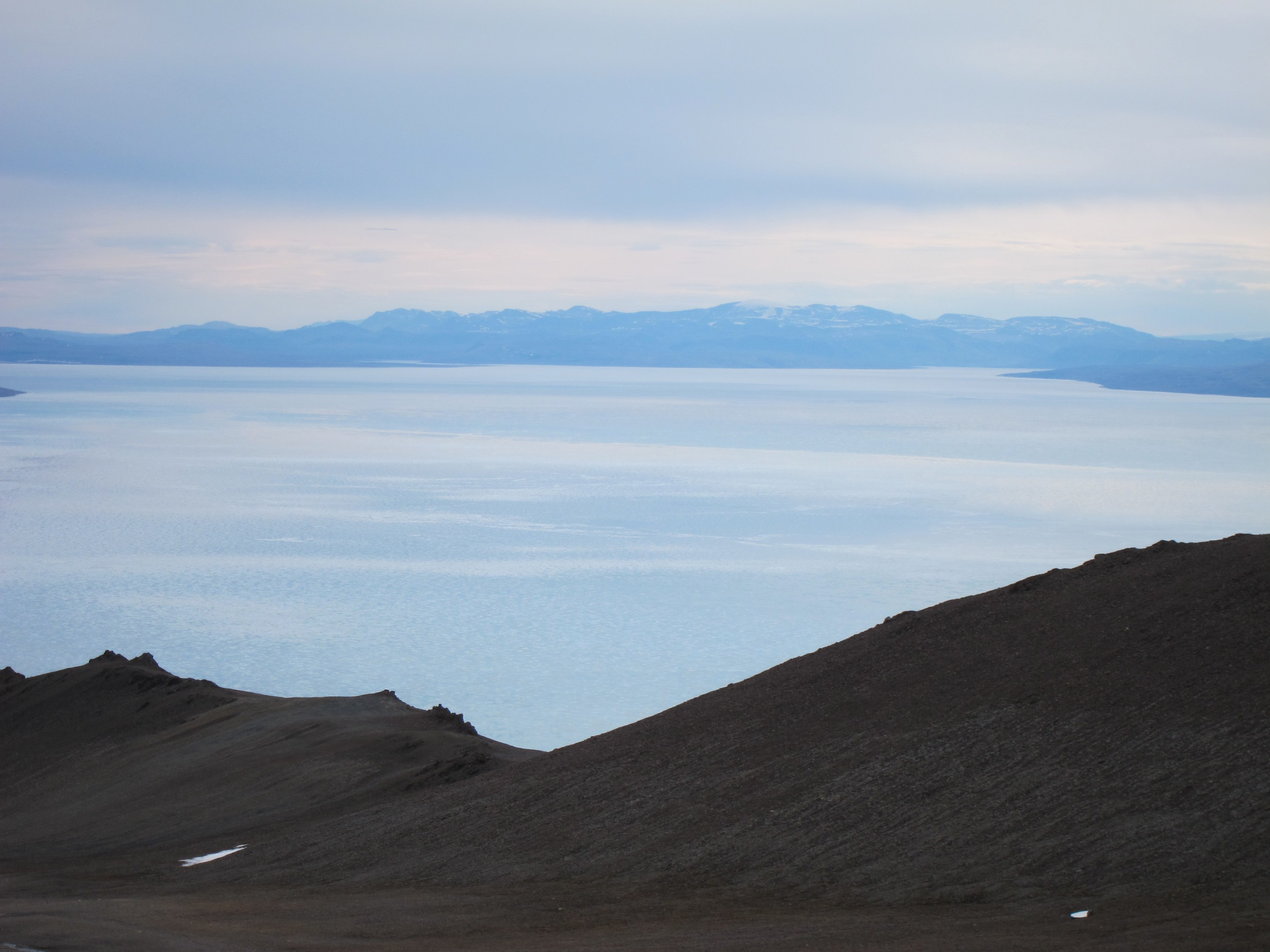 Majestic Eureka